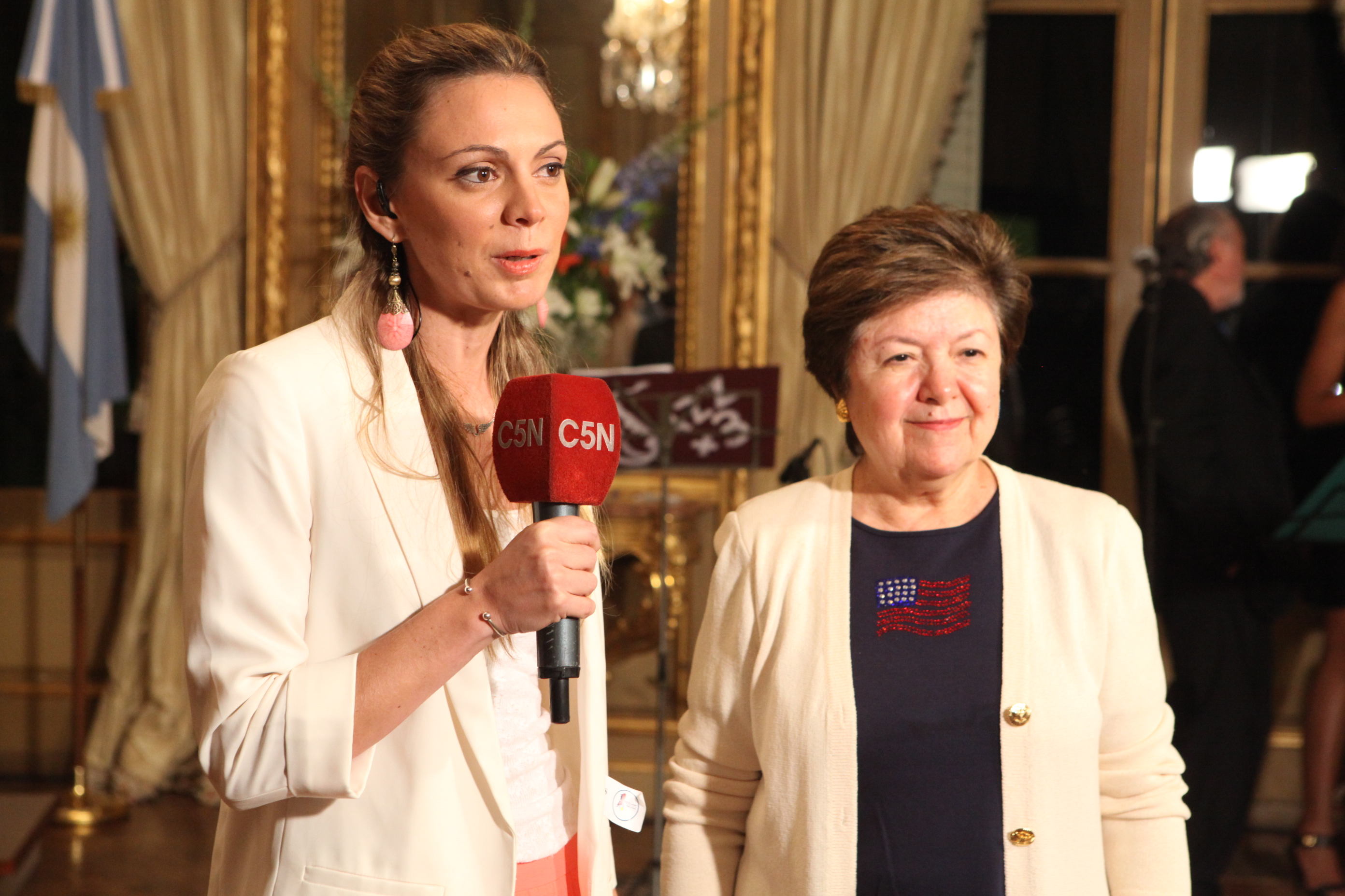 La Embajadora entrevistada por C5N La Embajadora entrevistada por C5N